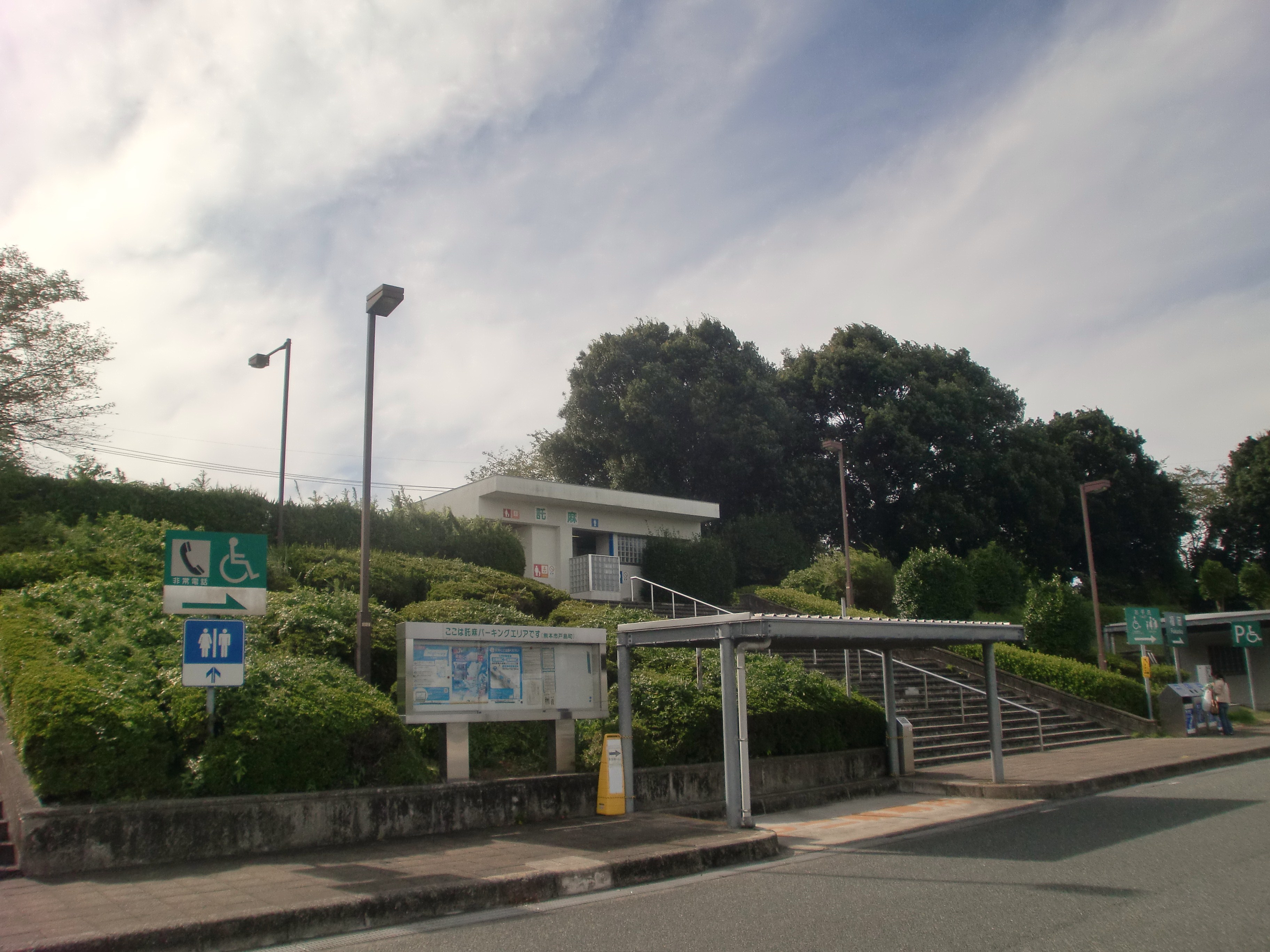 詫麻パーキングエリア上り線の外観。